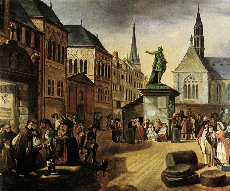 Léonard Defrance (1735–1805): Aufhebung von Klöstern durch Joseph II. (Kopie nach verlorenem Original von 1782), Musée communal, Herstal. Im Hintergrund fiktives Standbild des Kaisers als römischer Imperator.